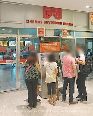 Fachada do Kinoplex Bay Market de Niterói, RJ, ainda com a marca antiga Severiano Ribeiro